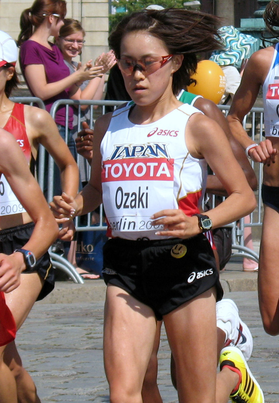 ベルリンでの尾崎好美（2009年8月23日）